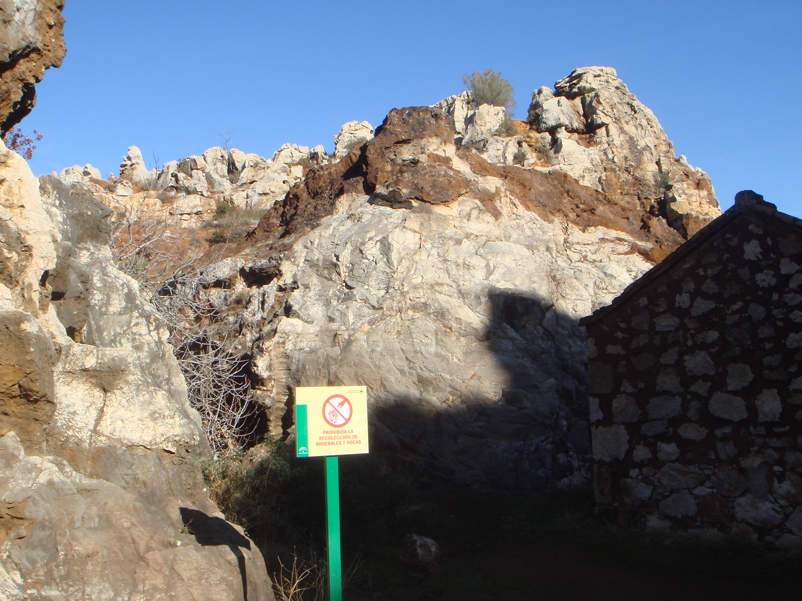 Cerro del hierro, Sevilla, España.